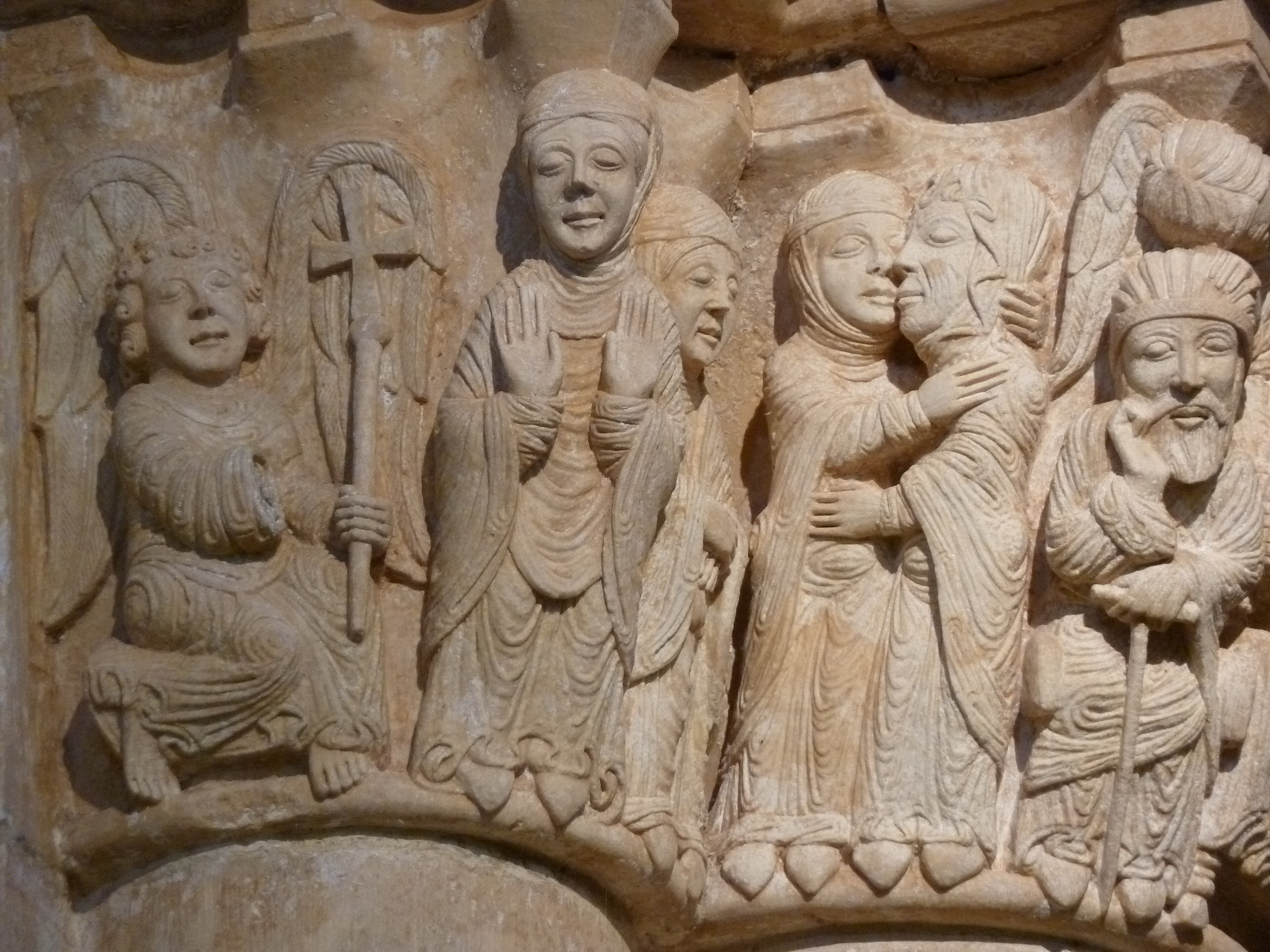 Capitel historiado narrando varias escenas evangélicas: Anunciación, Visitación y la Natividad. En el detalle se aprecia mejor la Anunciación en la que el ángel aparece arrodillado portando un báculo rematado en una cruz patada de tradición hispanovisigoda. María, como es habitual, con las palmas de las manos vueltas hacia afuera. En este capitel acontece el llamado “Milagro de la luz”, que con la luz del sol poniente se iluminan durante los equinoccios de primavera y de otoño a eso de las 5 pm hora solar, comenzando por la escena de la Anunciación y finalizando en la del Nacimiento.